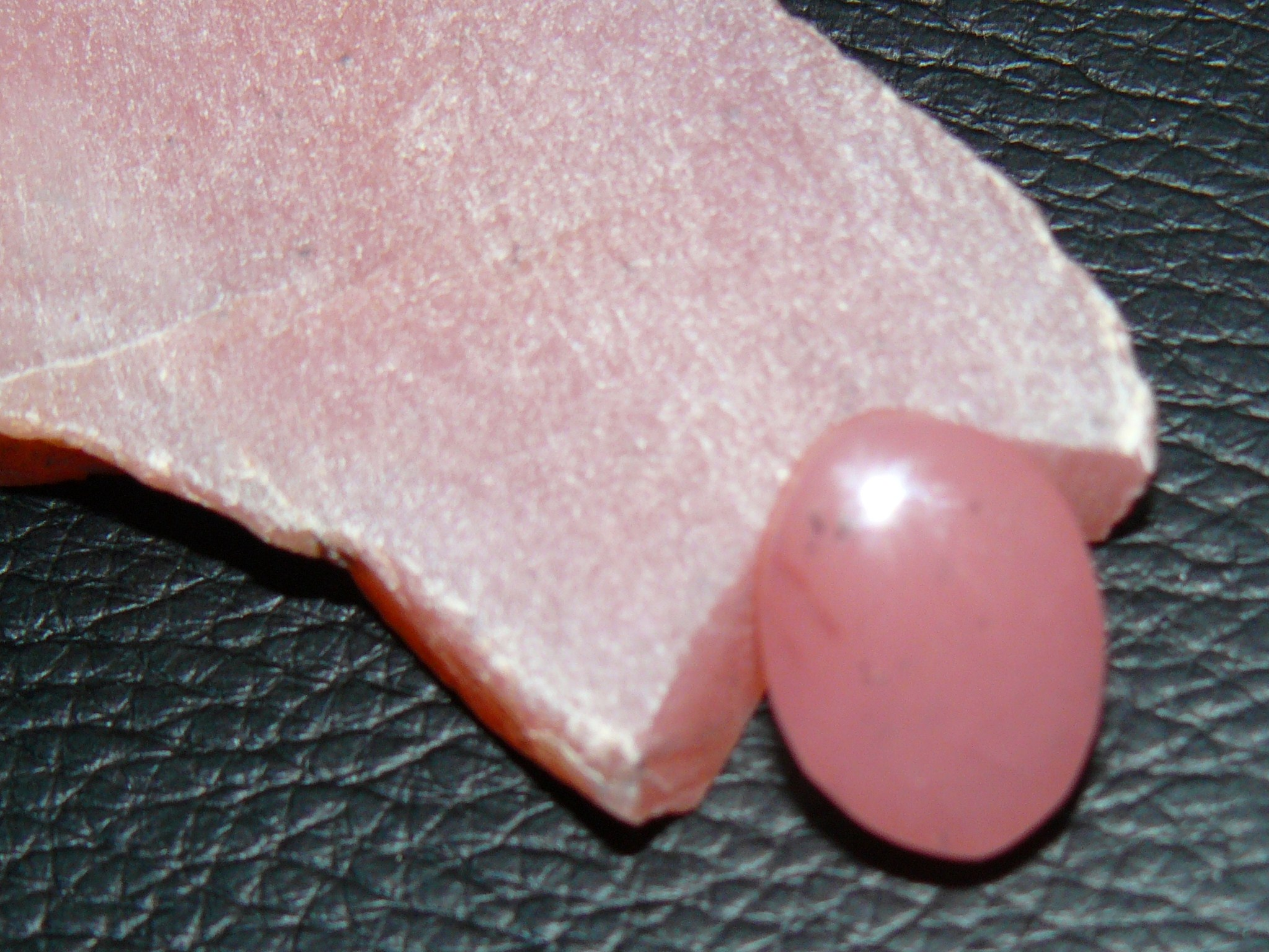 Foto van cabochon geslepen uit het ruwe stuk roze Hydrogrossulaar